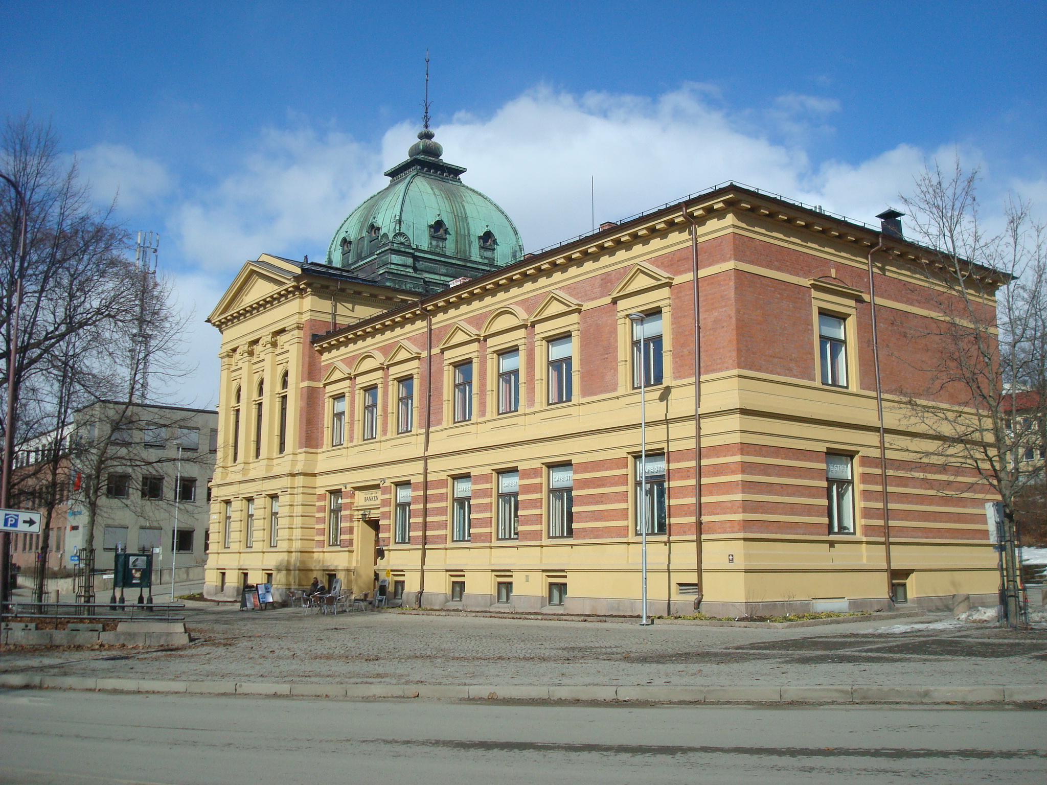 Kulturhuset Banken på Lillehammer